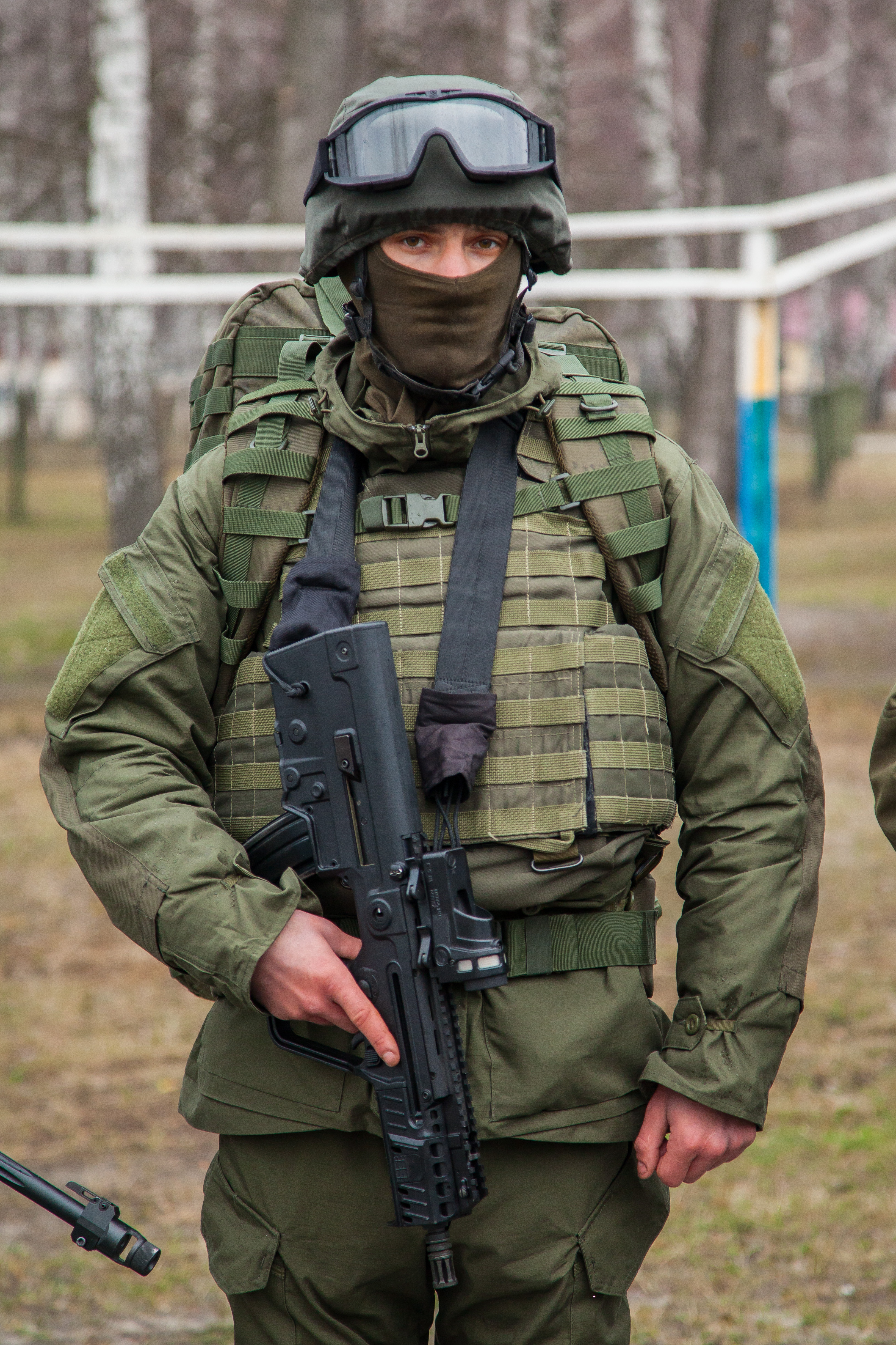 nekrasov (56)